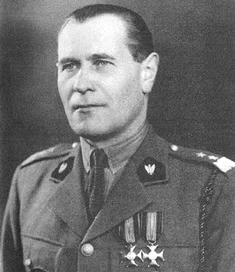 General Zygmunt Bohusz-Szyszko of Polish 2 Corps in Italy